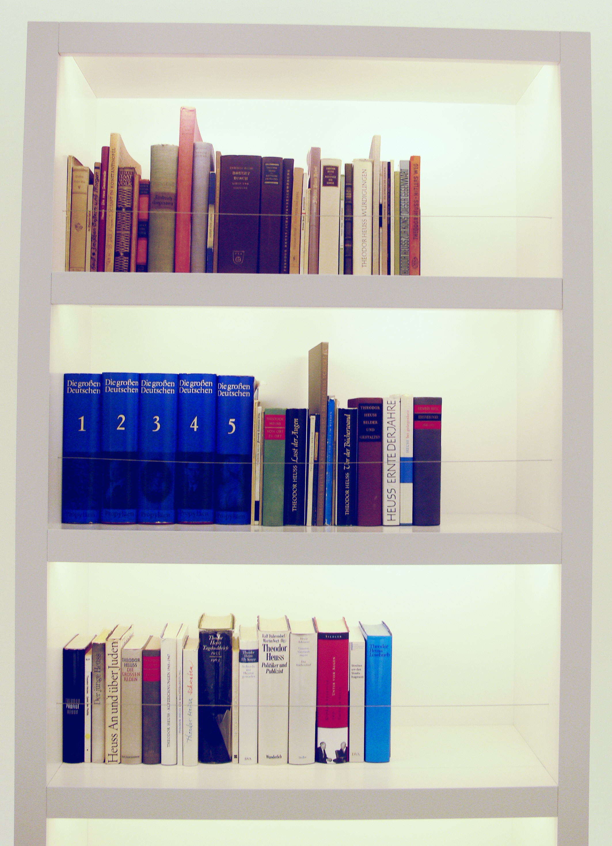 Theodor-Heuss-Haus, Feuerbacher Weg, Stuttgart-Nord Regal mit sämtlichen Werken von Theodor Heuss im Erinnerungsraum (an der Stelle des Schlafzimmers von Theodor Heuss, in dem er starb)